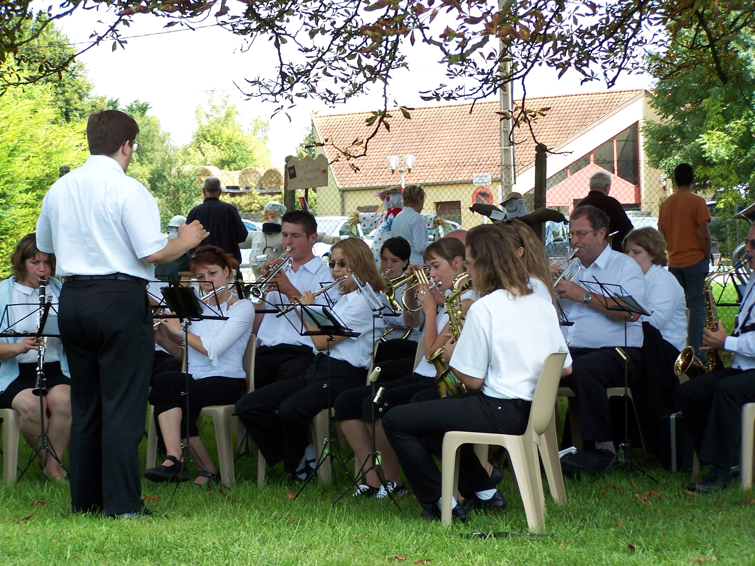 l'Entente Musicale lors de la Fête des fleurs 2006 à Molliens-Dreuil